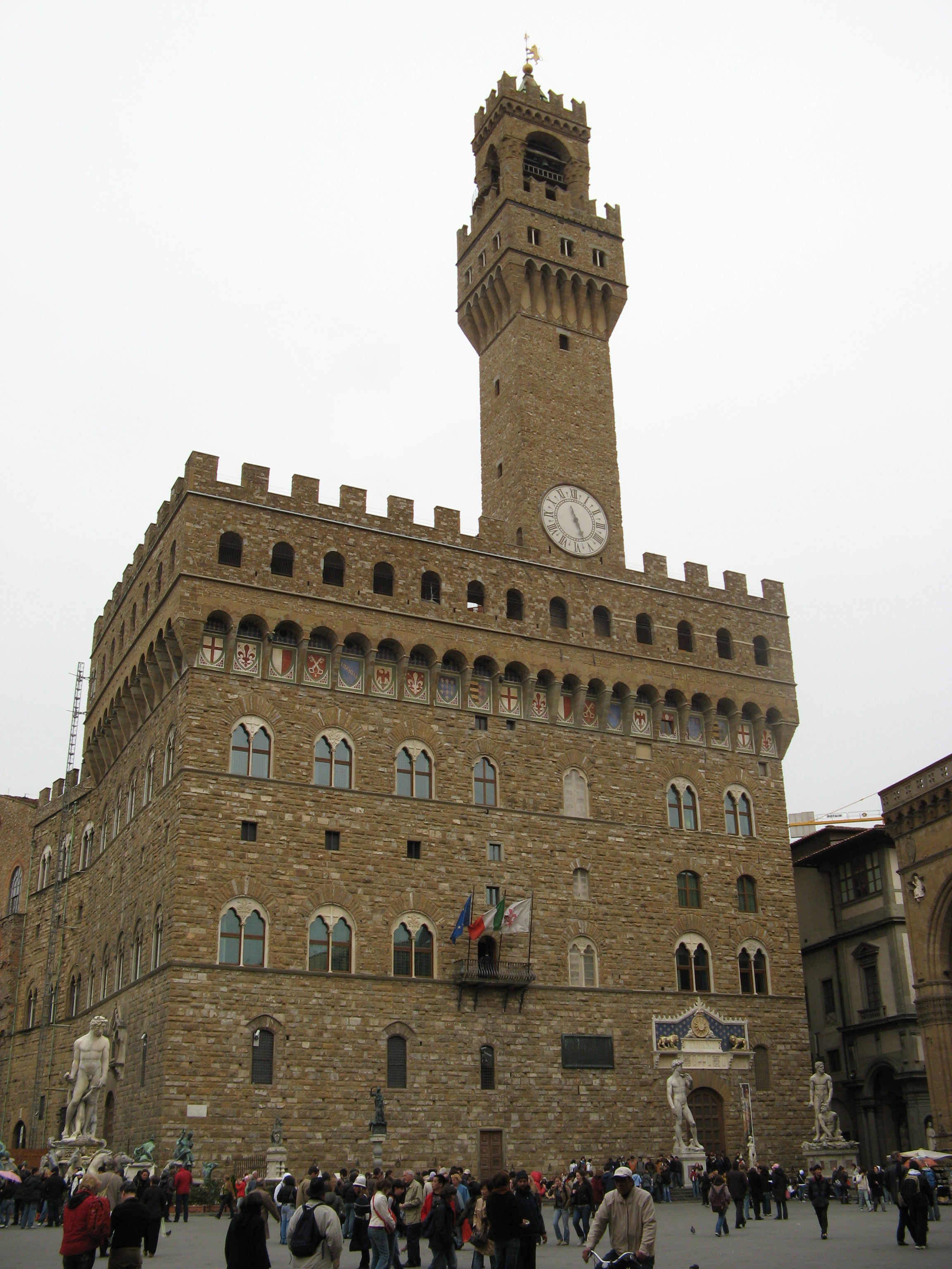 Palazzo Vecchio o Palazzo della Signoria, Firenze